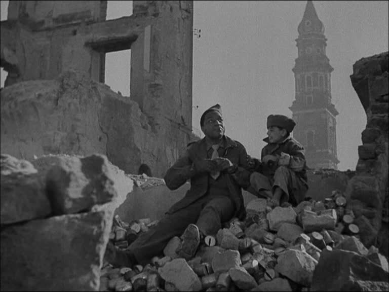 Screenshot del film Paisà (1946)